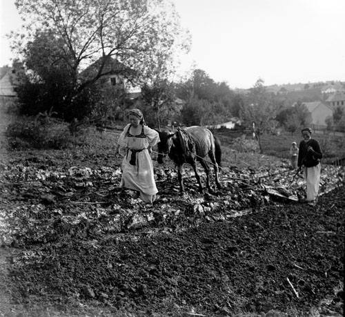 Bosna - polní práce